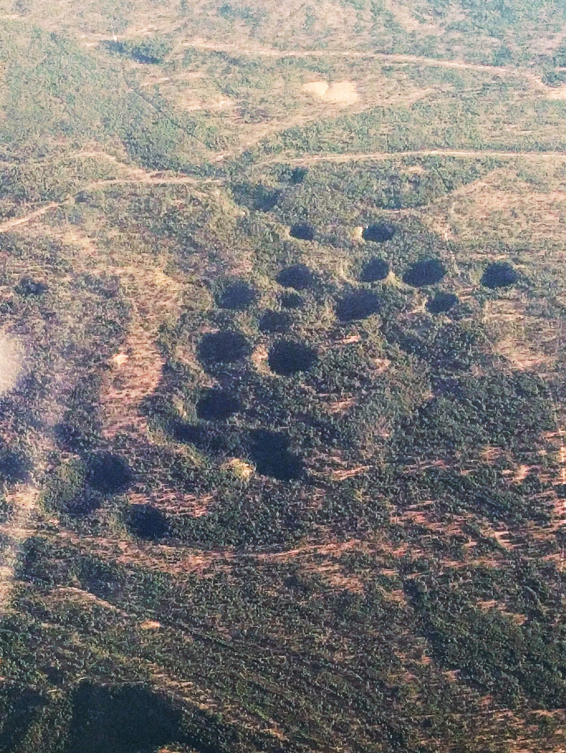 Vista aérea de las Torcas de los Palancares, Cuenca